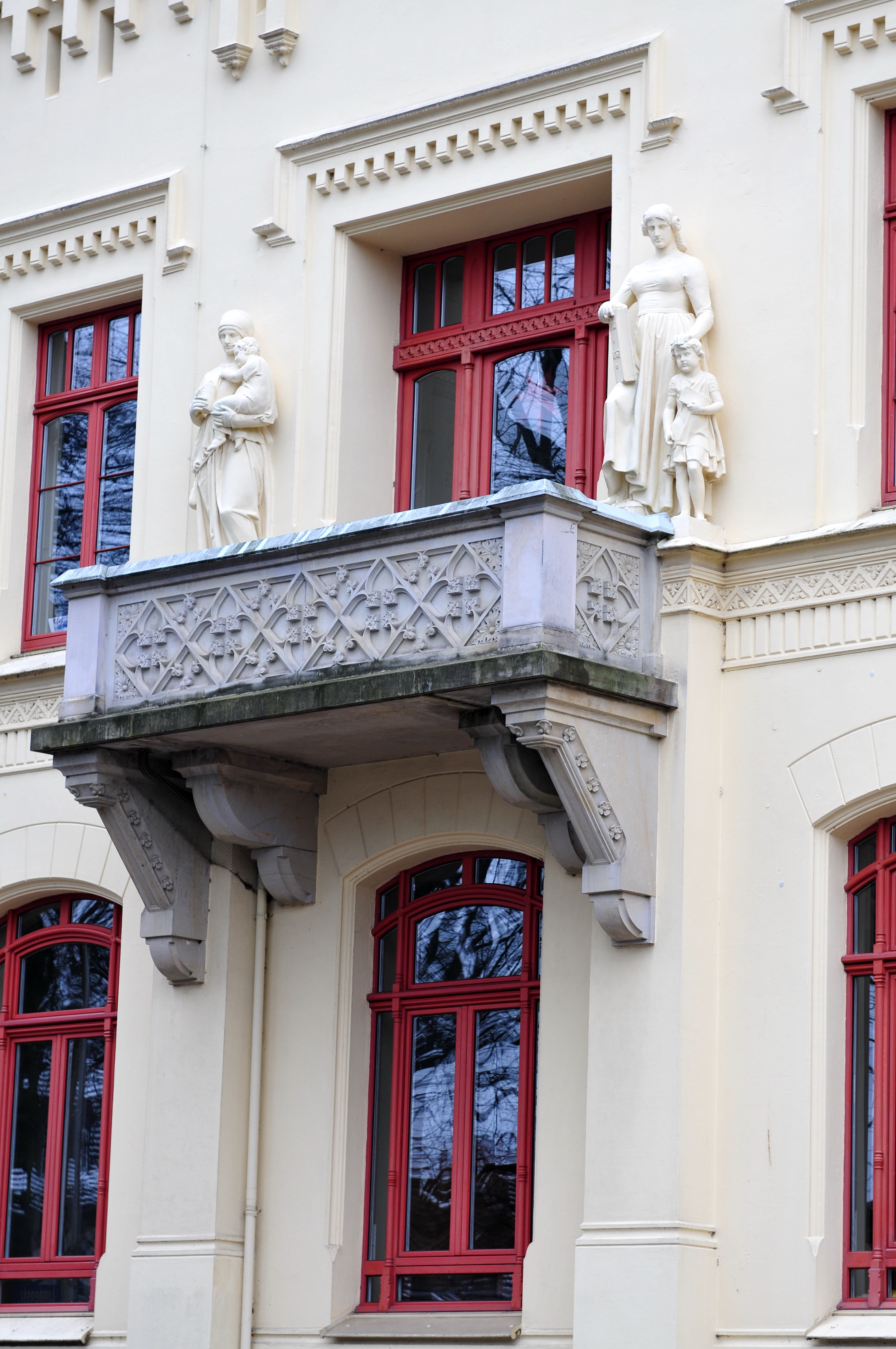 Fassadenelemente, Balkon und Fenster der denkmalgeschützten ehemaligen Ersparnisanstalt (Vorläufer der Sparkasse) Lindenstraße 1 / Puschkinstraße 2/4 im Stadtteil Schelfstadt in Schwerin, Mecklenburg-Vorpommern.